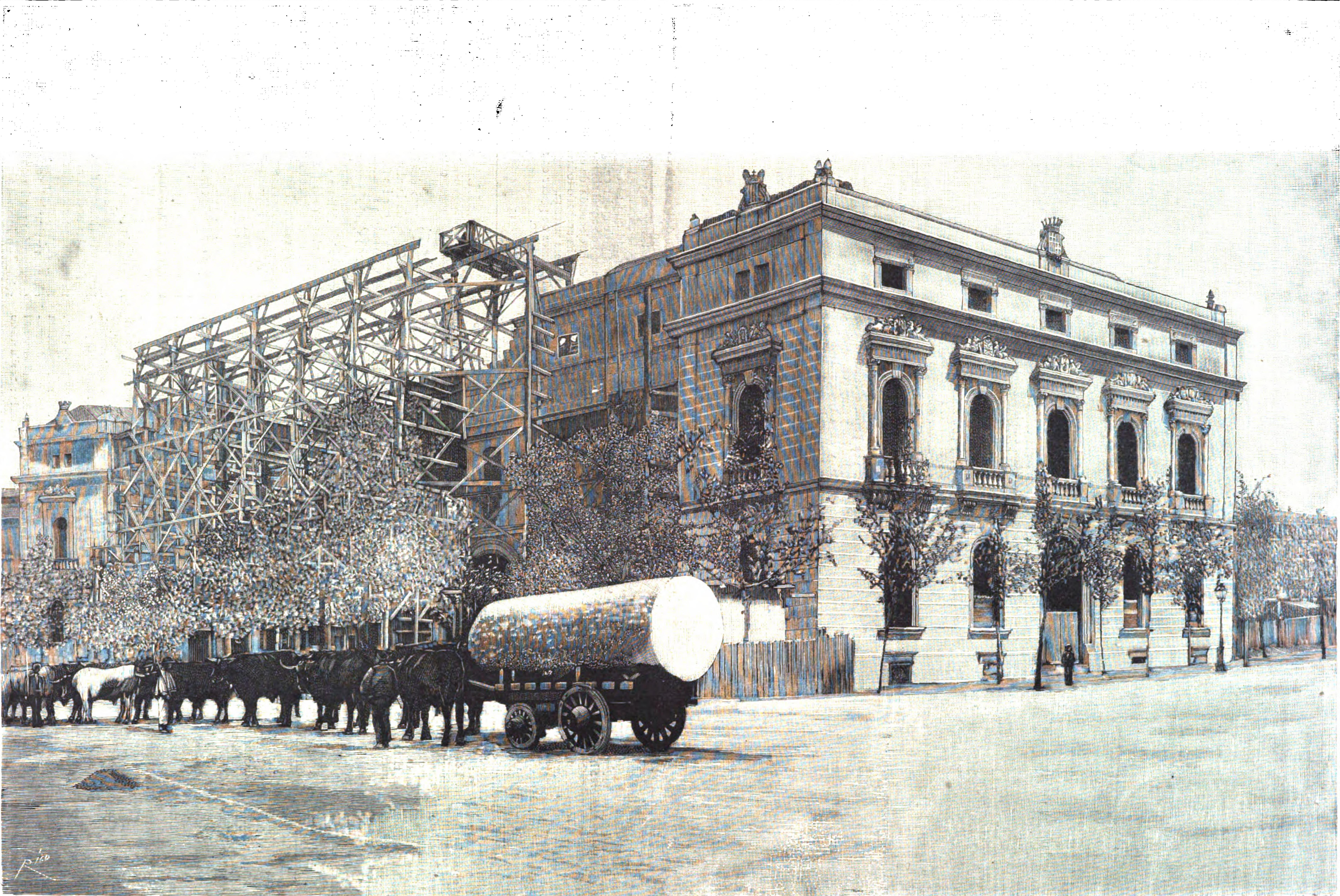 Madrid.—Fachadas principal (con la andamiada correspondiente al pórtico) y lateral de la nueva Bolsa de Comercio, en construcción.